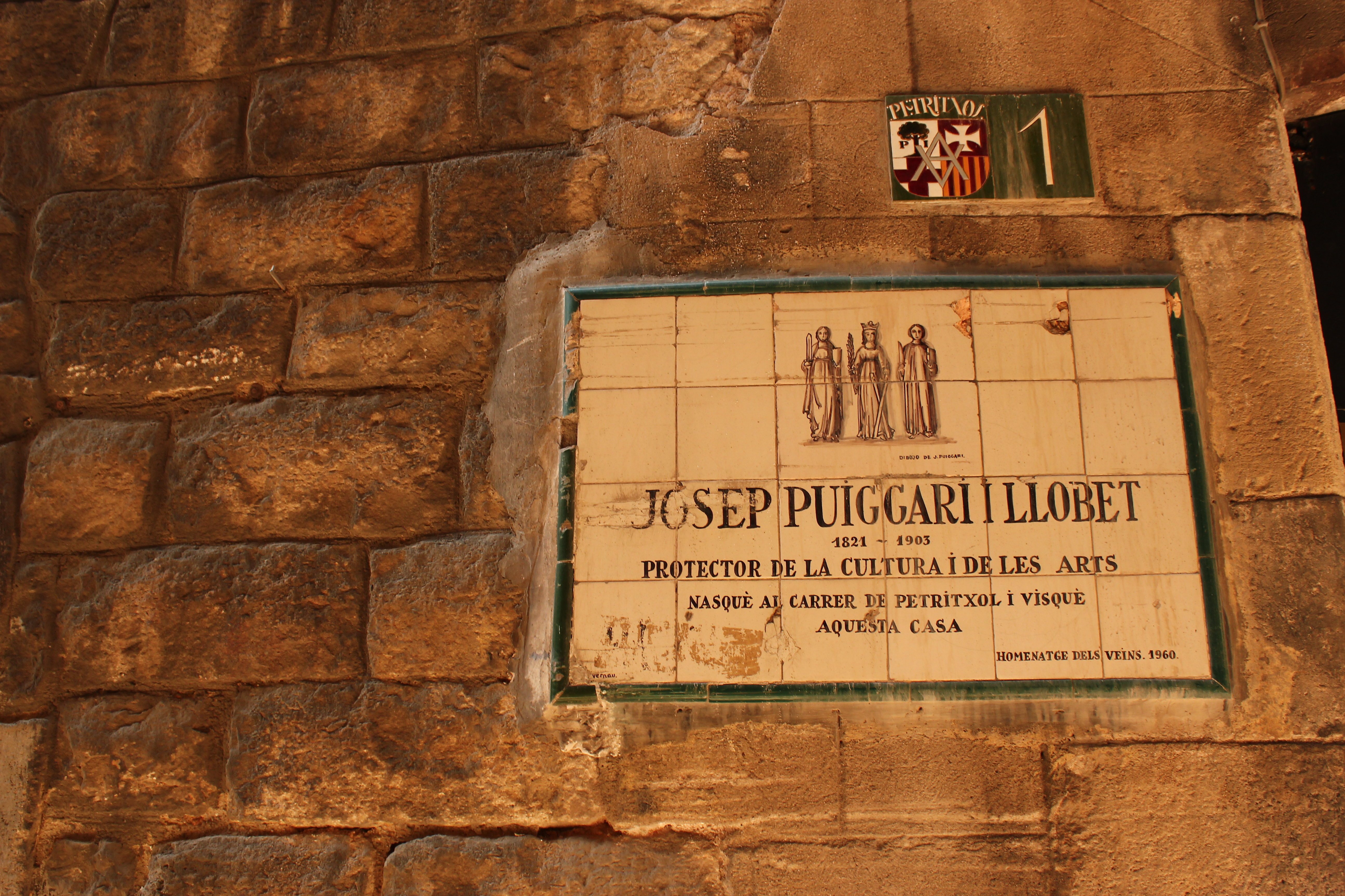 Edifici d'habitatges c. Petritxol, 1 (Barcelona)